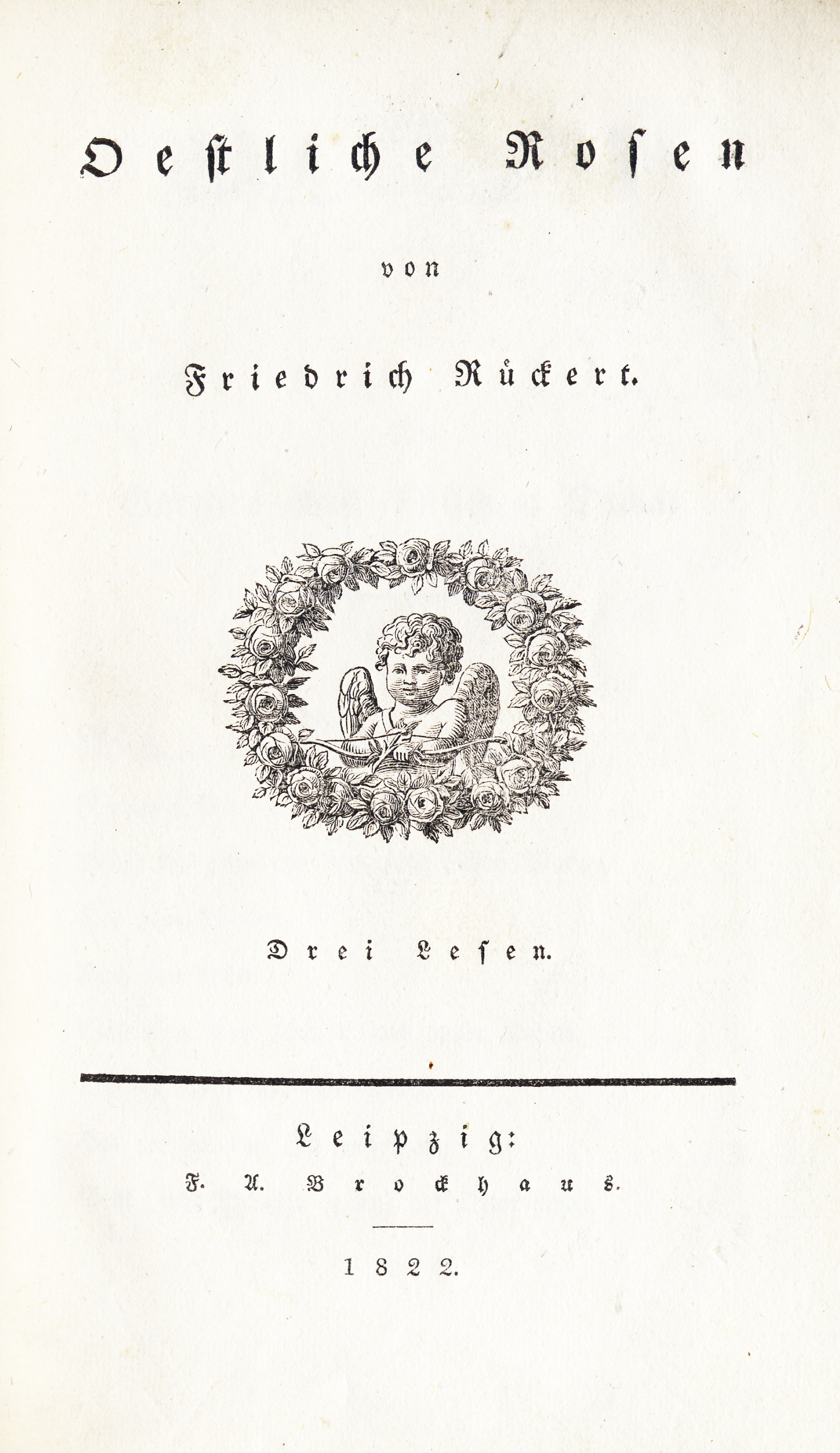 Leipzig: Brockhaus 1822. Titelblatt.